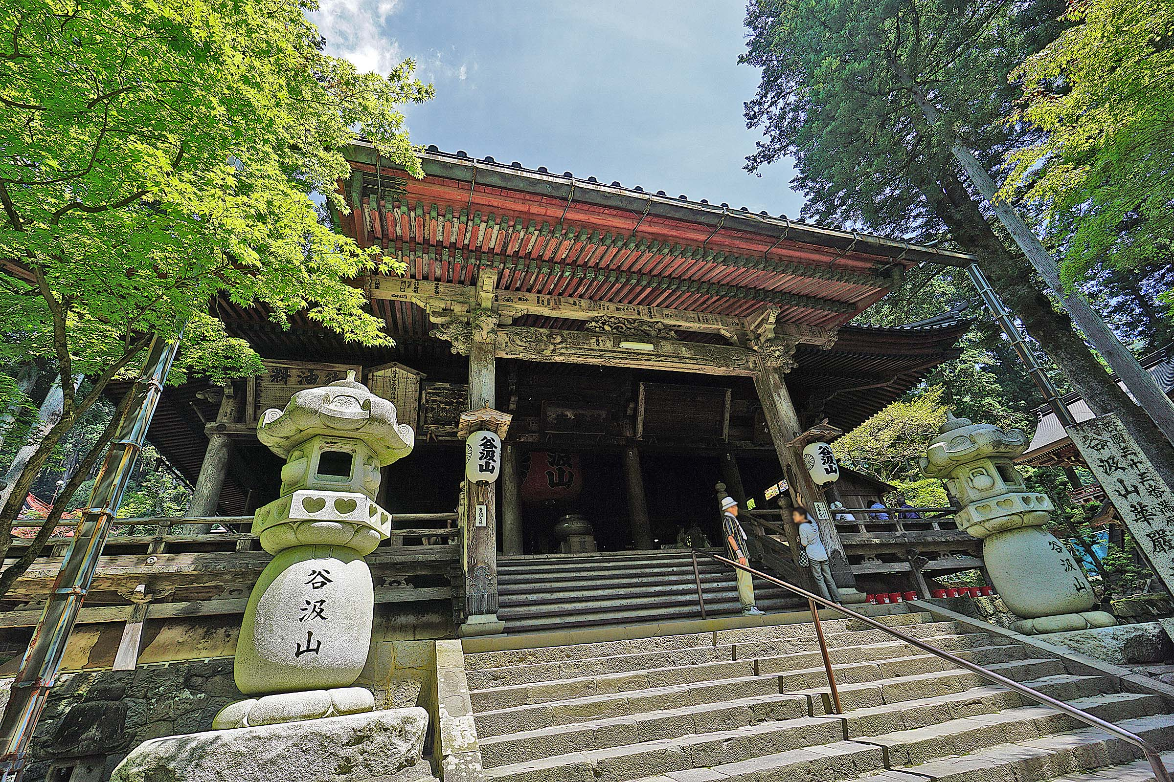 Tanugumisan Kegonji temple , 谷汲山華厳寺